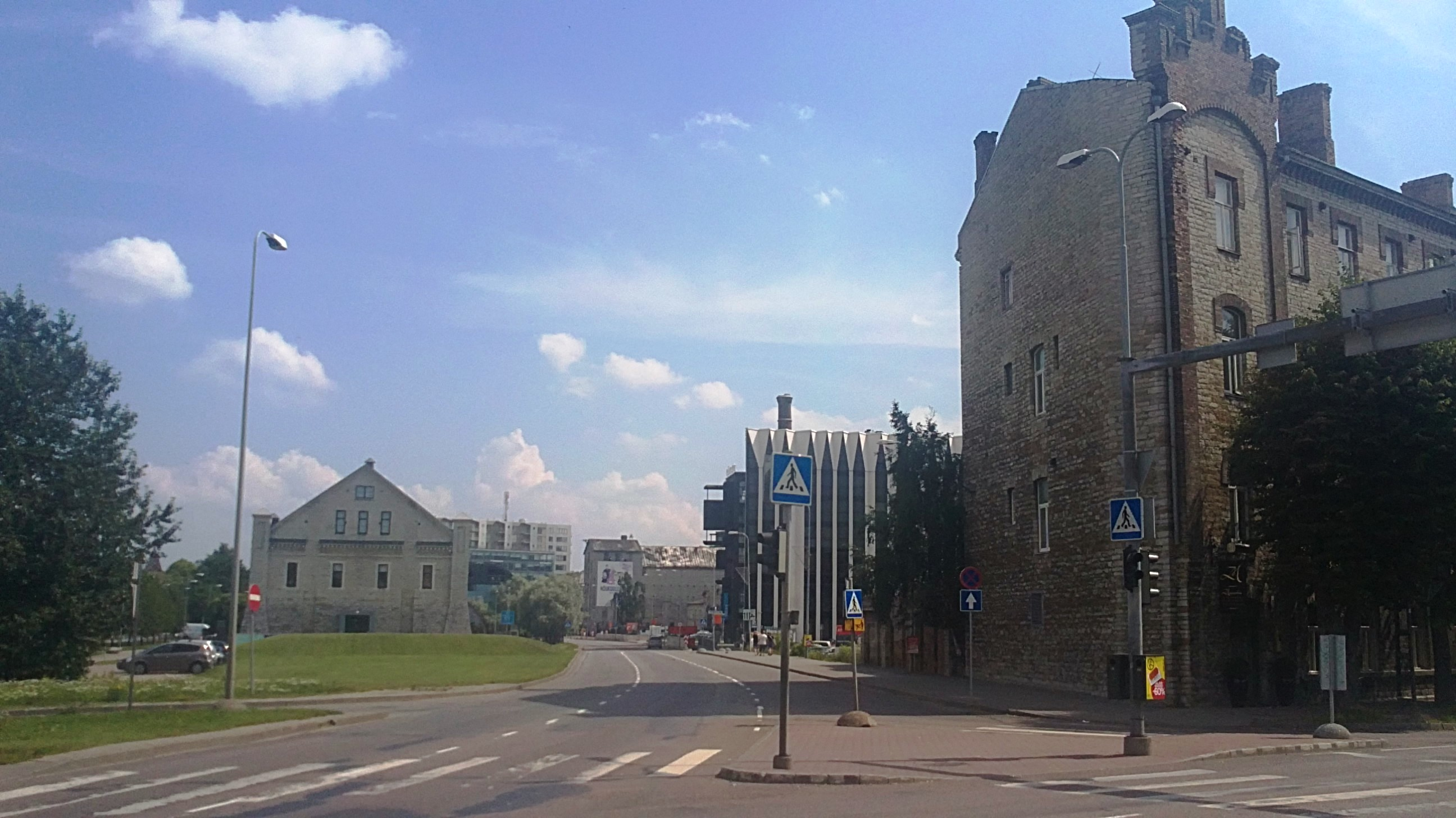 Ahtri tänav, Tallinna kesklinnas, vaade Mere puiestee ja Ahtri tänava ristmikult Jõe tänava ristmiku poole